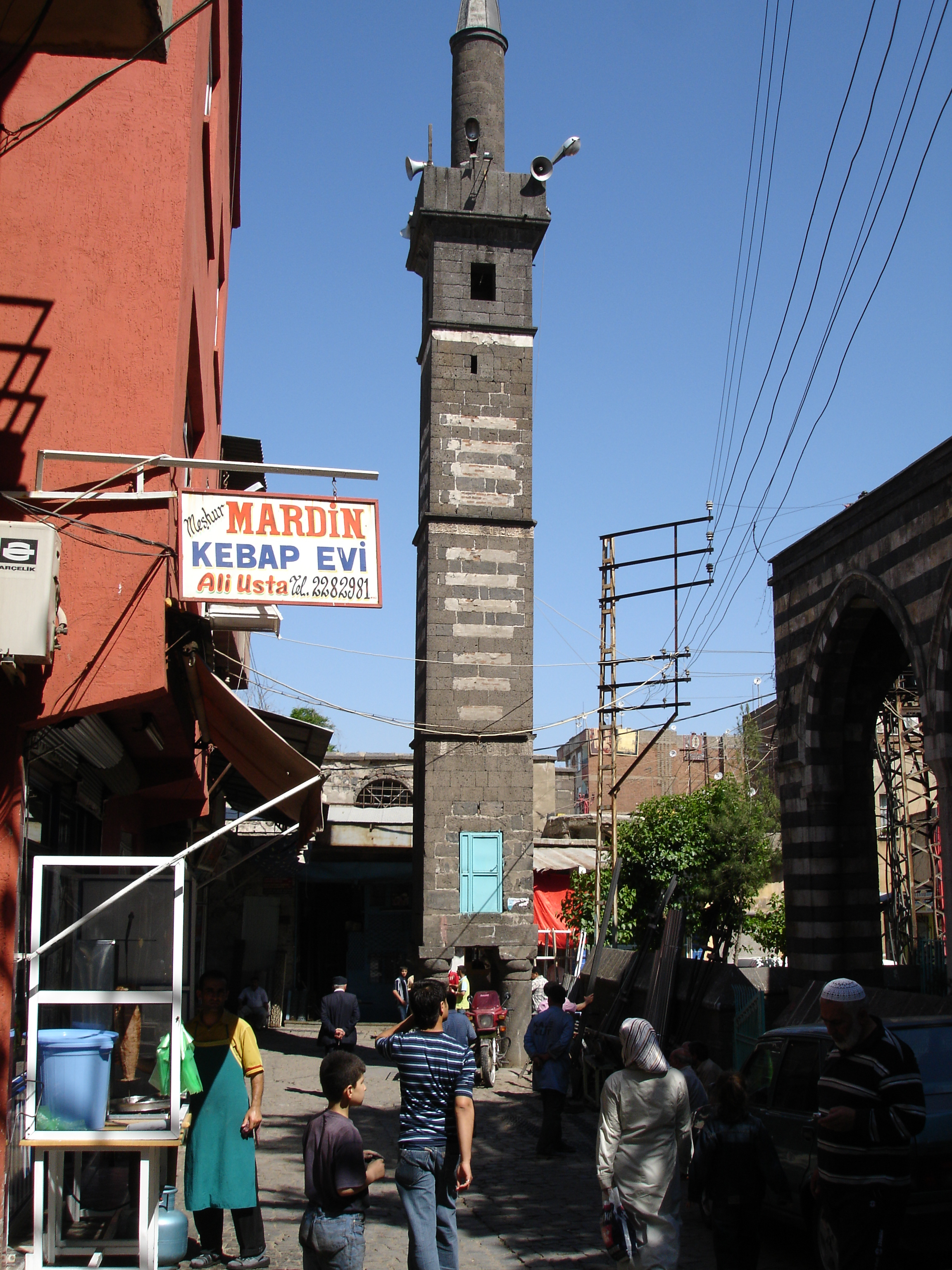 Diyarbakırın Tarihi dört ayaklı Minaresi.